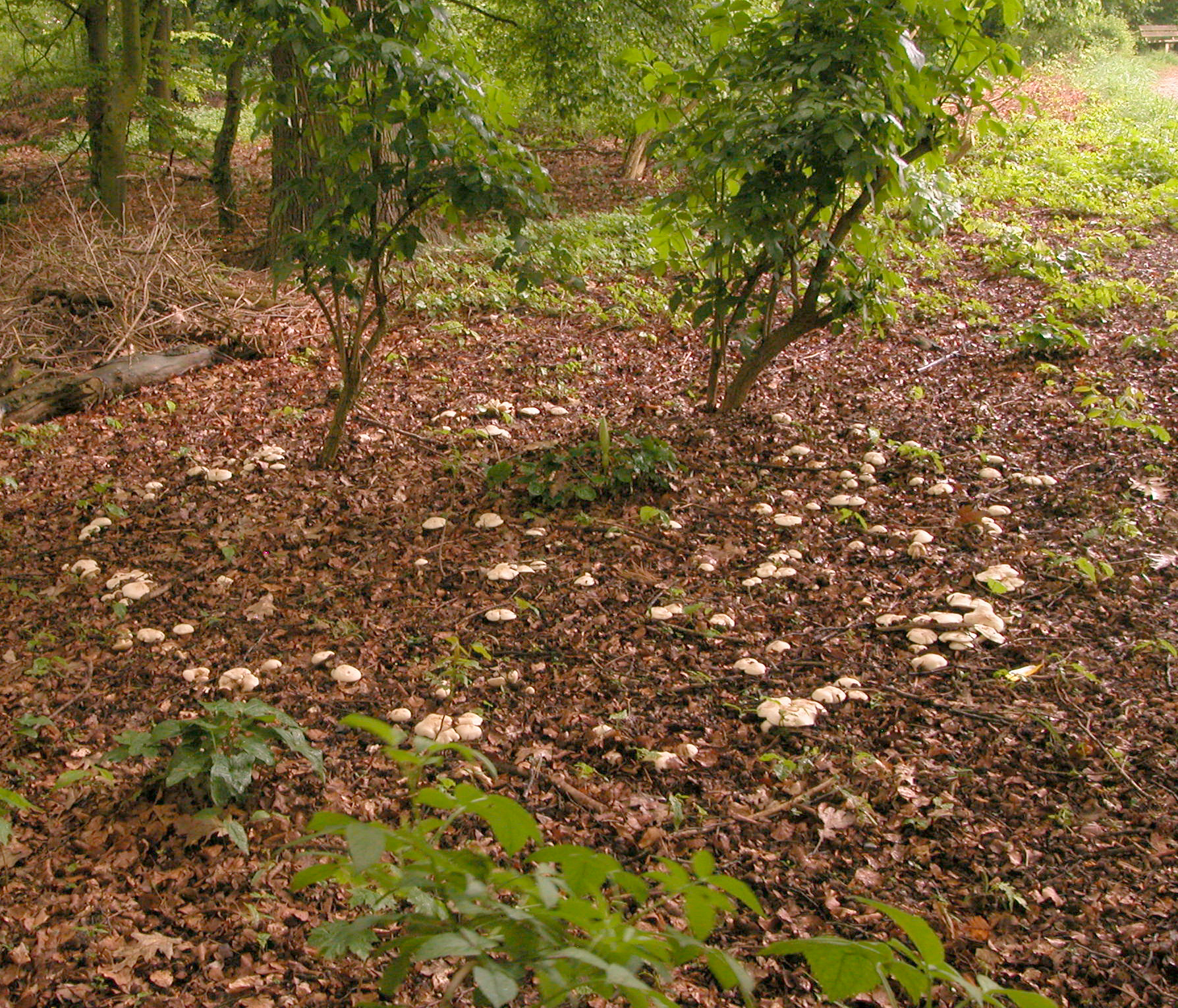 Maipilze (Calocybe gambosa) im Hexenring, LSG Witthausbusch in Mülheim an der Ruhr